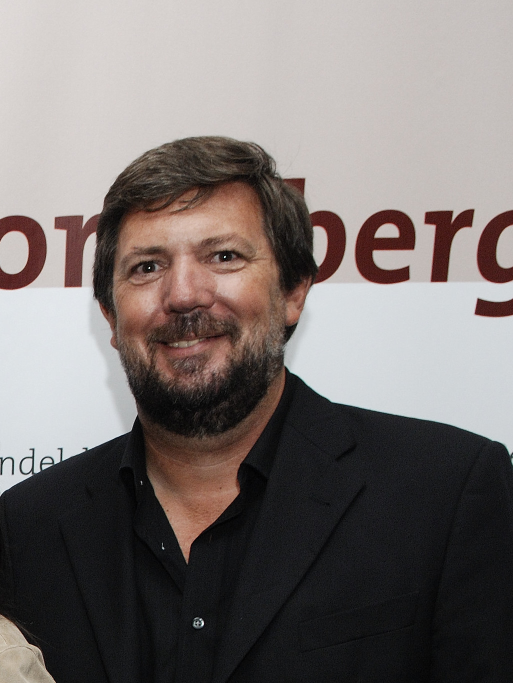 LAbg. Werner Posch beim Bregenzer Kunstverein Magazin 4. Foto: Thomas Jantzen.